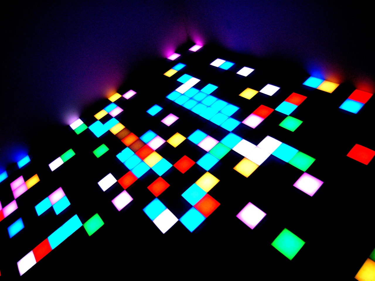 Illuminated dancefloor